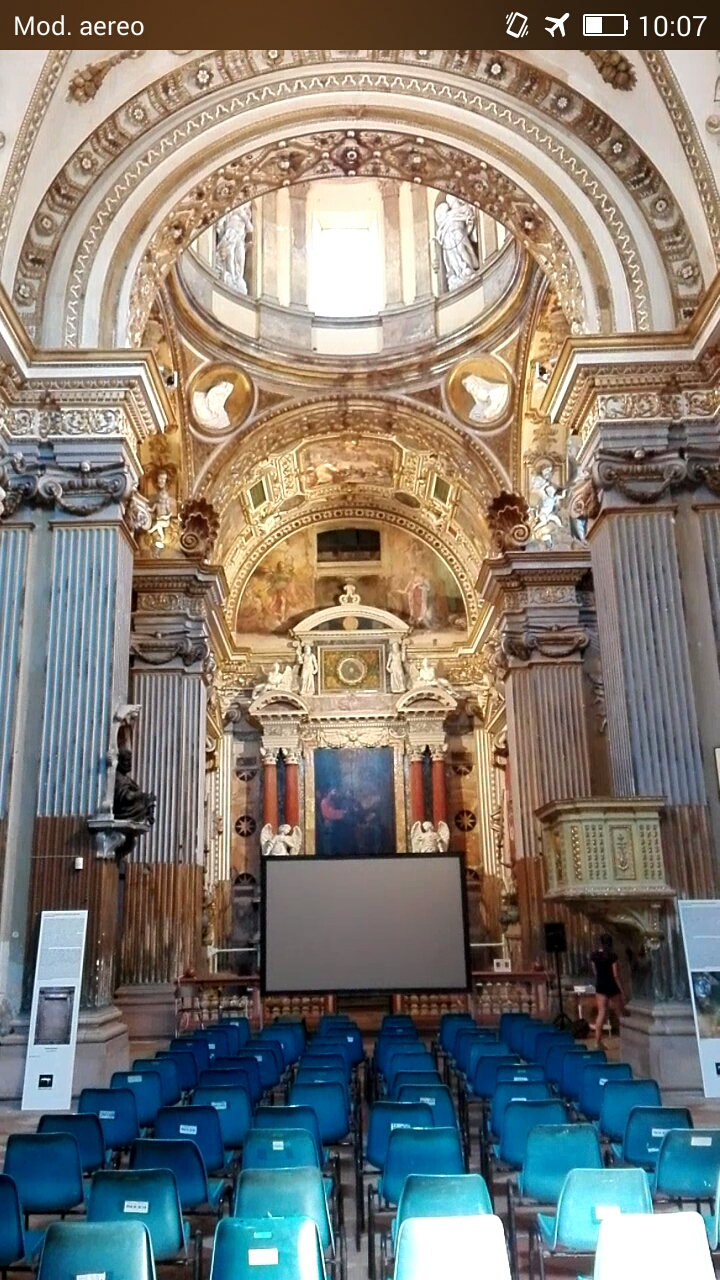 Chiesa